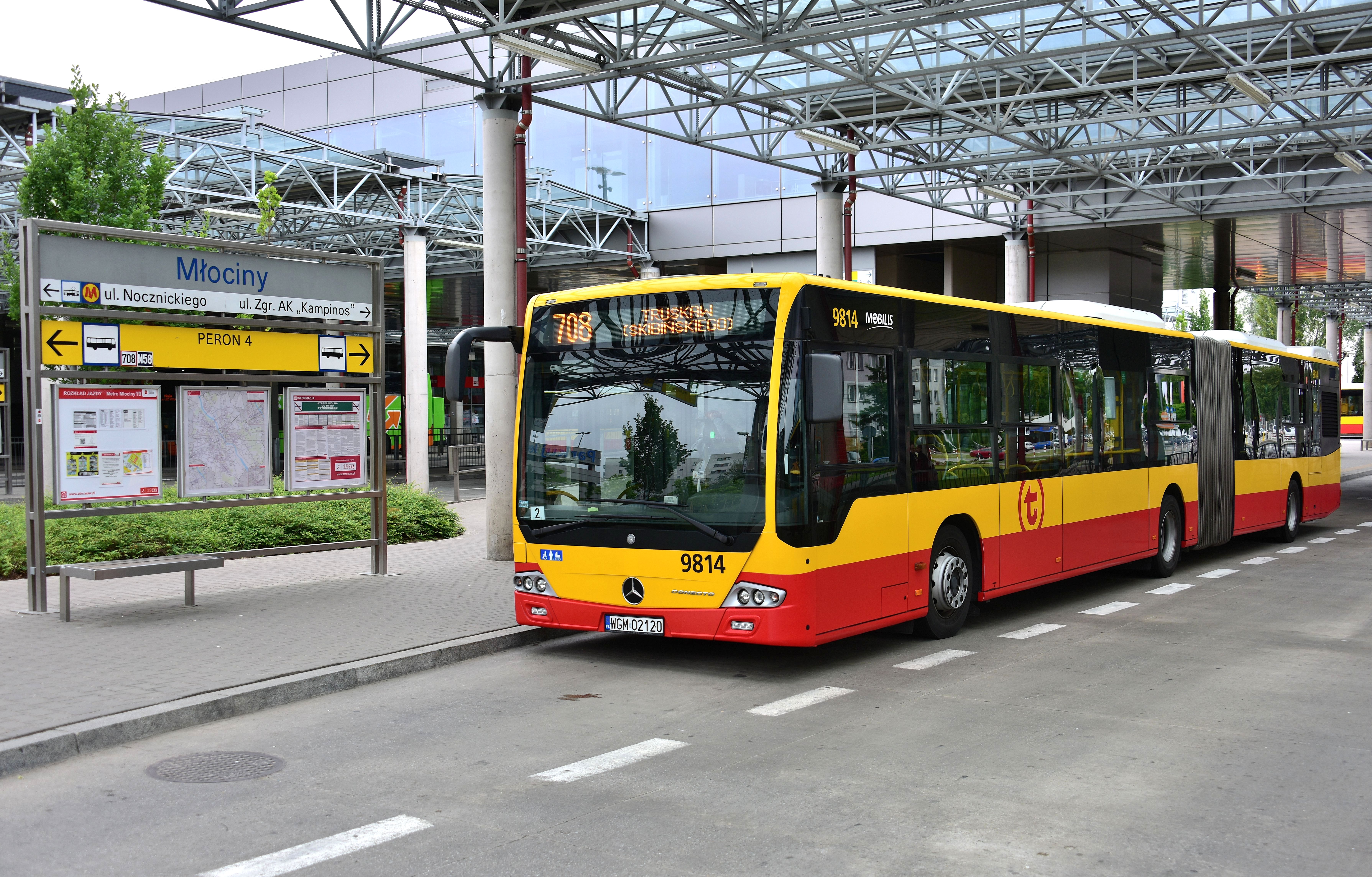 Mercedes Conecto G spółki Mobilis na węźle komunikacyjnym Młociny w Warszawie